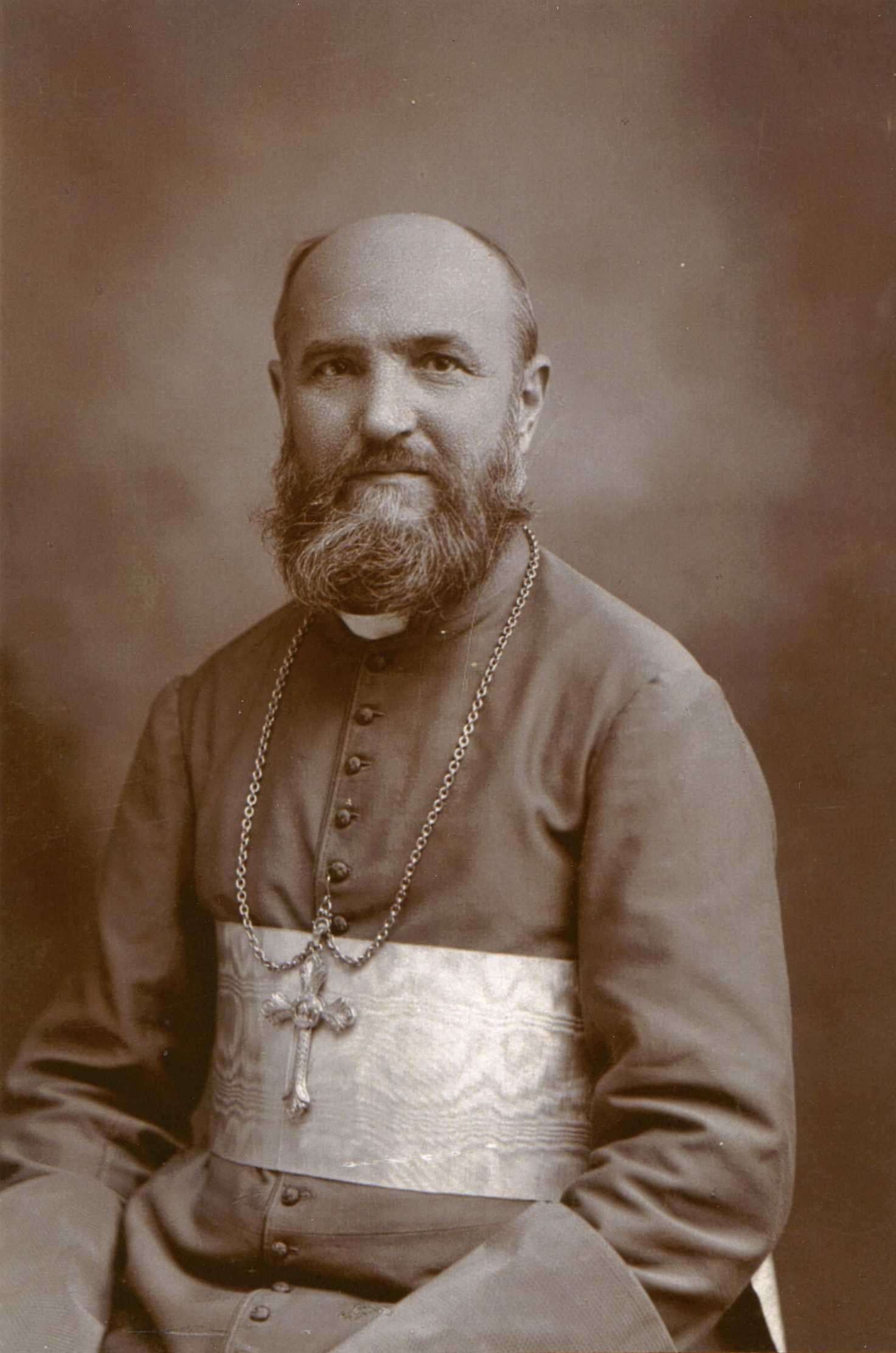 portrait individuel